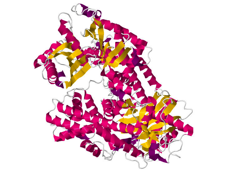 Hexokinase